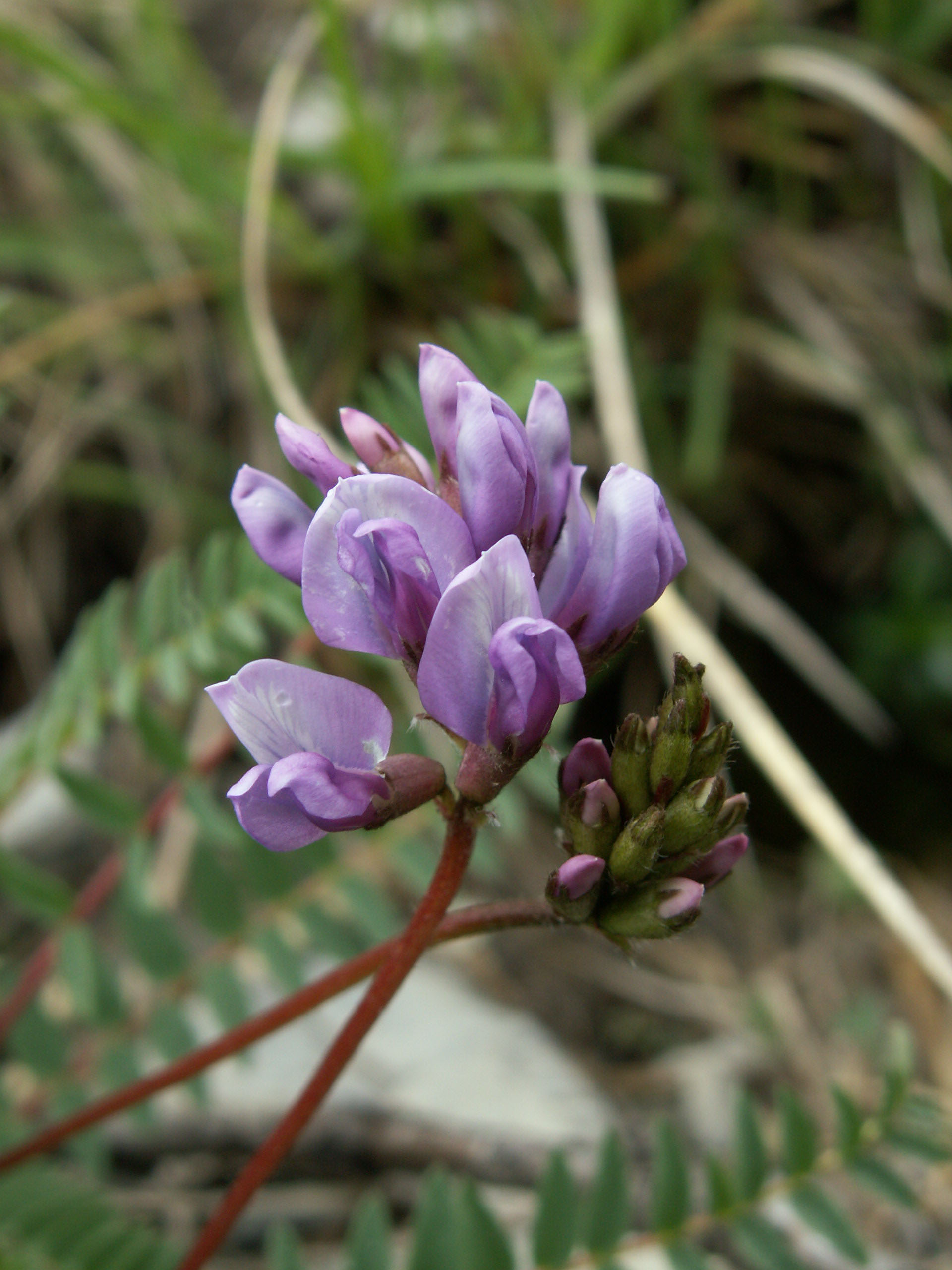 Berg-Spitzkiel (Oxytropis jacquinii), Schynige Platte, Kanton Bern, Schweiz